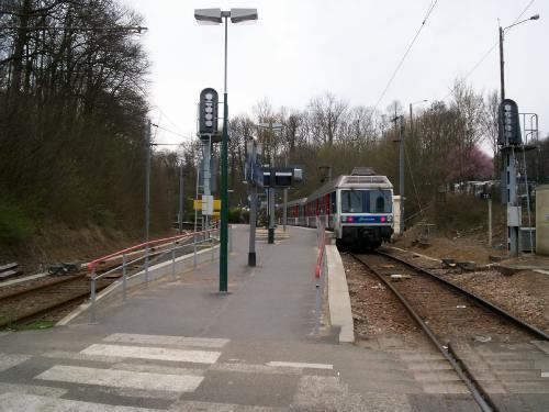 Train SILS au terminus Transilien L à Saint-Nom